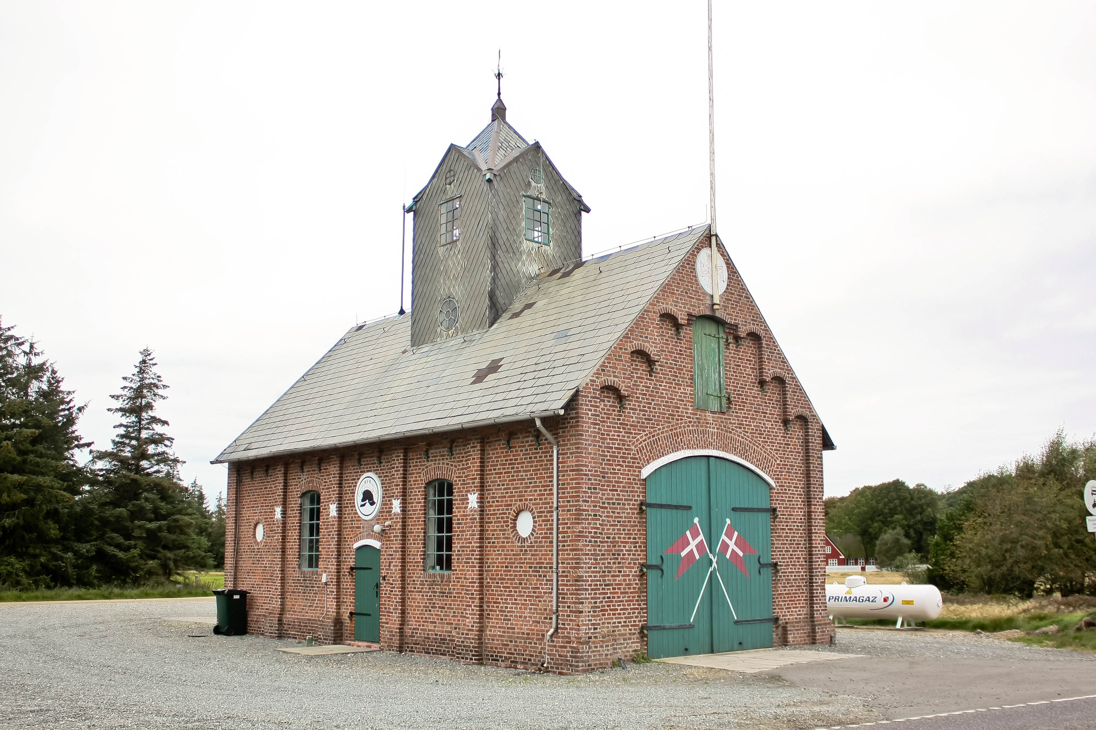 Den gamle Redningsstation, Havnebyvej 156, Rømø